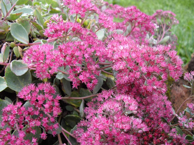 Sedum cauticola 'Lidakense'